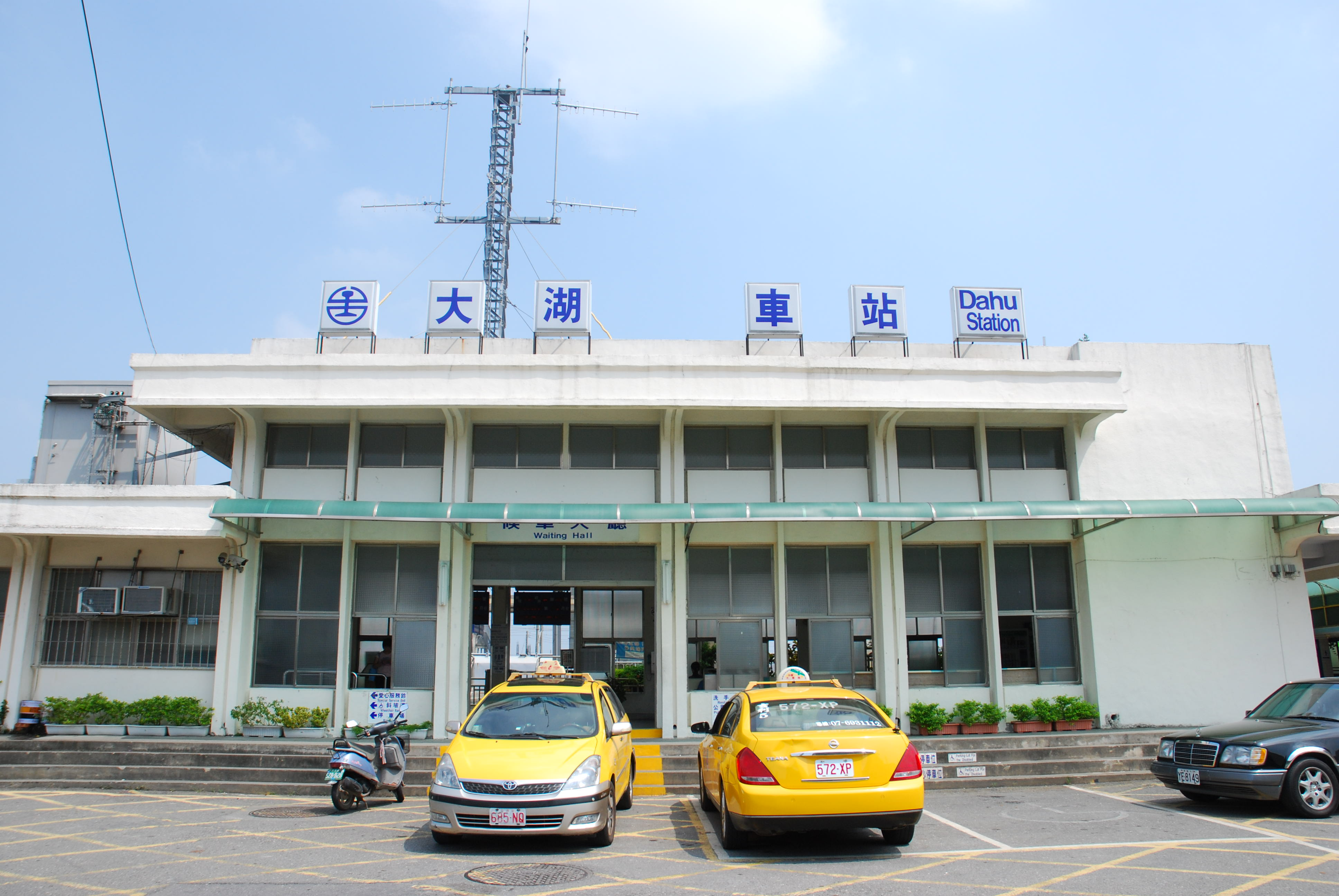 中文（台灣）: 臺灣鐵路管理局大湖車站候車大廳。